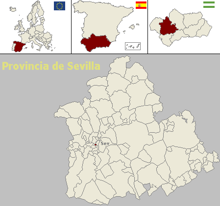 Mapa de localización del municipio sevillano de Castilleja de la Cuesta (Andalucía, España)